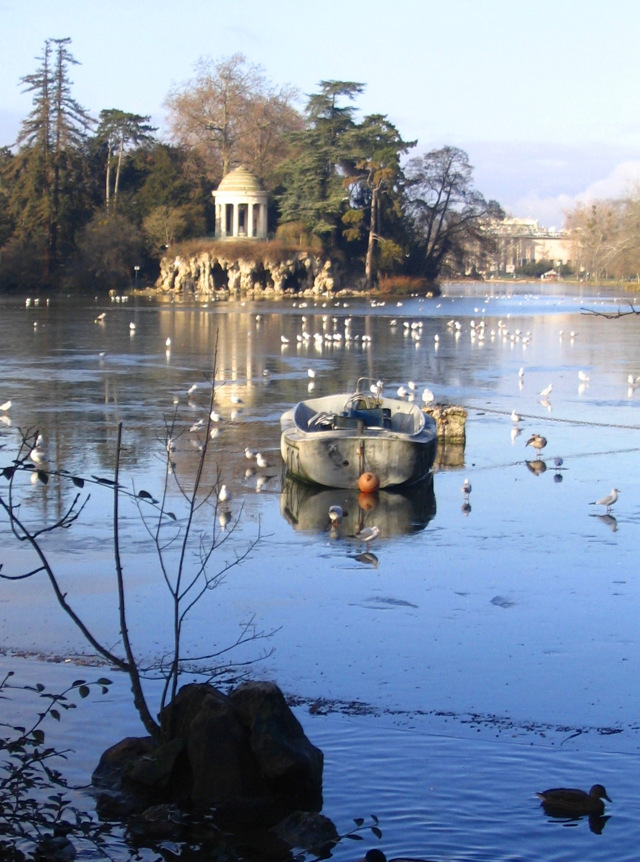 Lac Daumesnil, vue du temple de l'amour (réalisé par Gabriel Davioud en 1860) - Bois de Vincennes - France